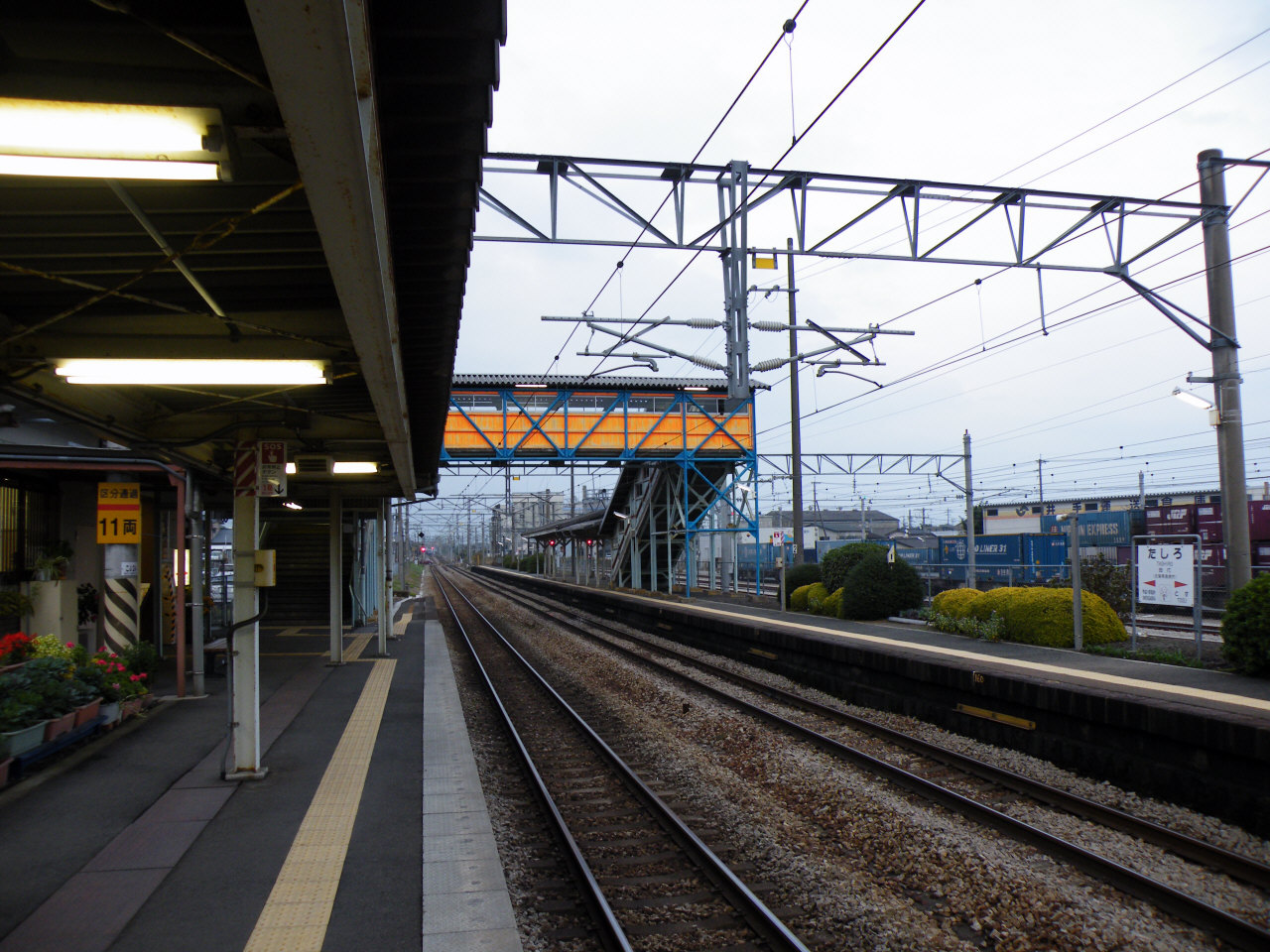 JR九州田代駅構内